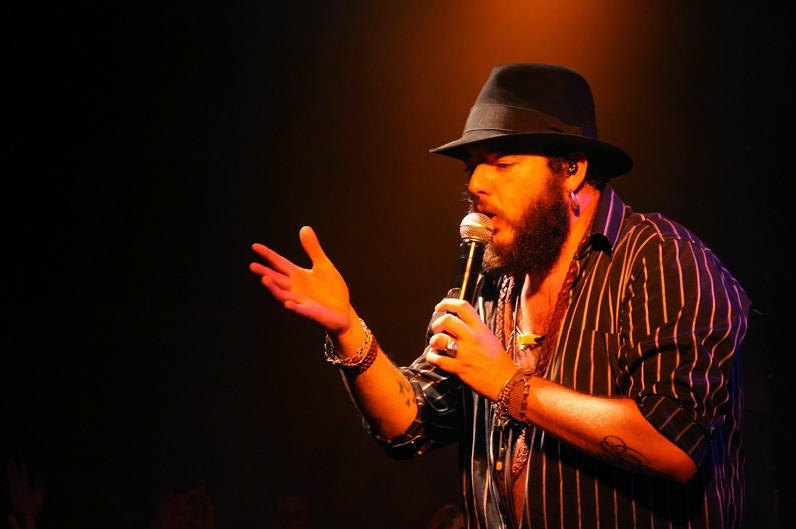 Kutxi Romero - Marea en Montevideo Rompiendo el Tango Tour 2007